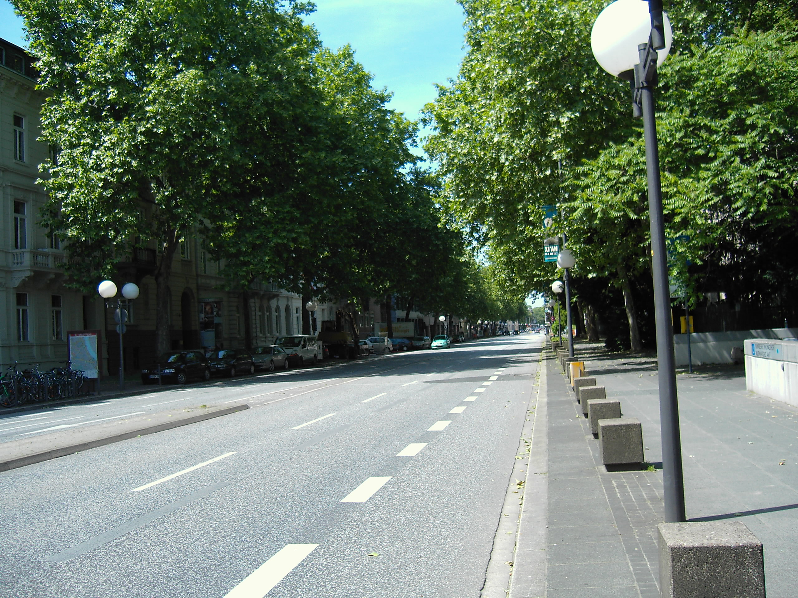 Die Bundesstraße 9 im Bereich des Bundesviertels als Konrad-Adenauer-Allee.